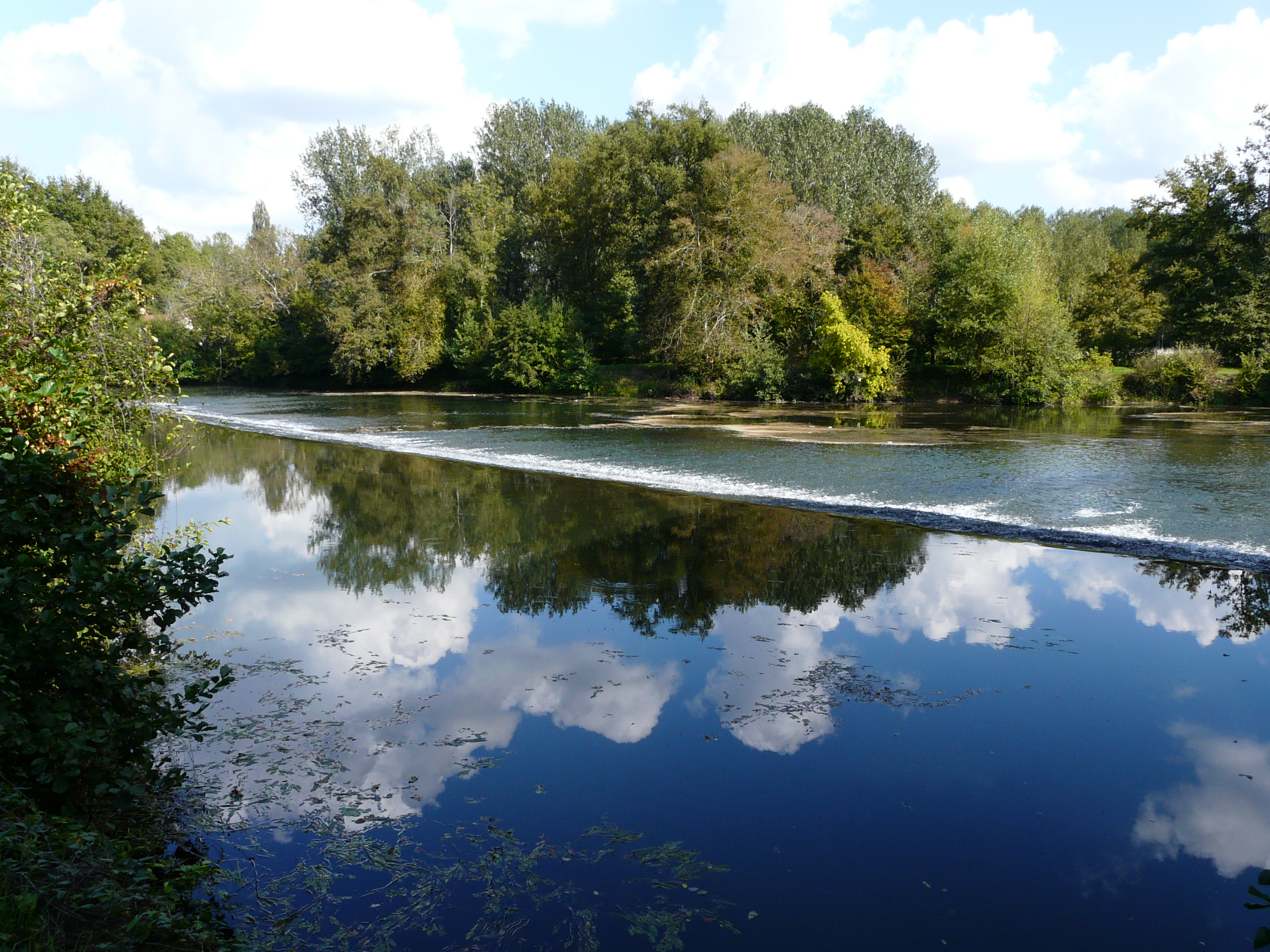 L'Isle au barrage de Mauriac, entre Douzillac et Neuvic, Dordogne, France.